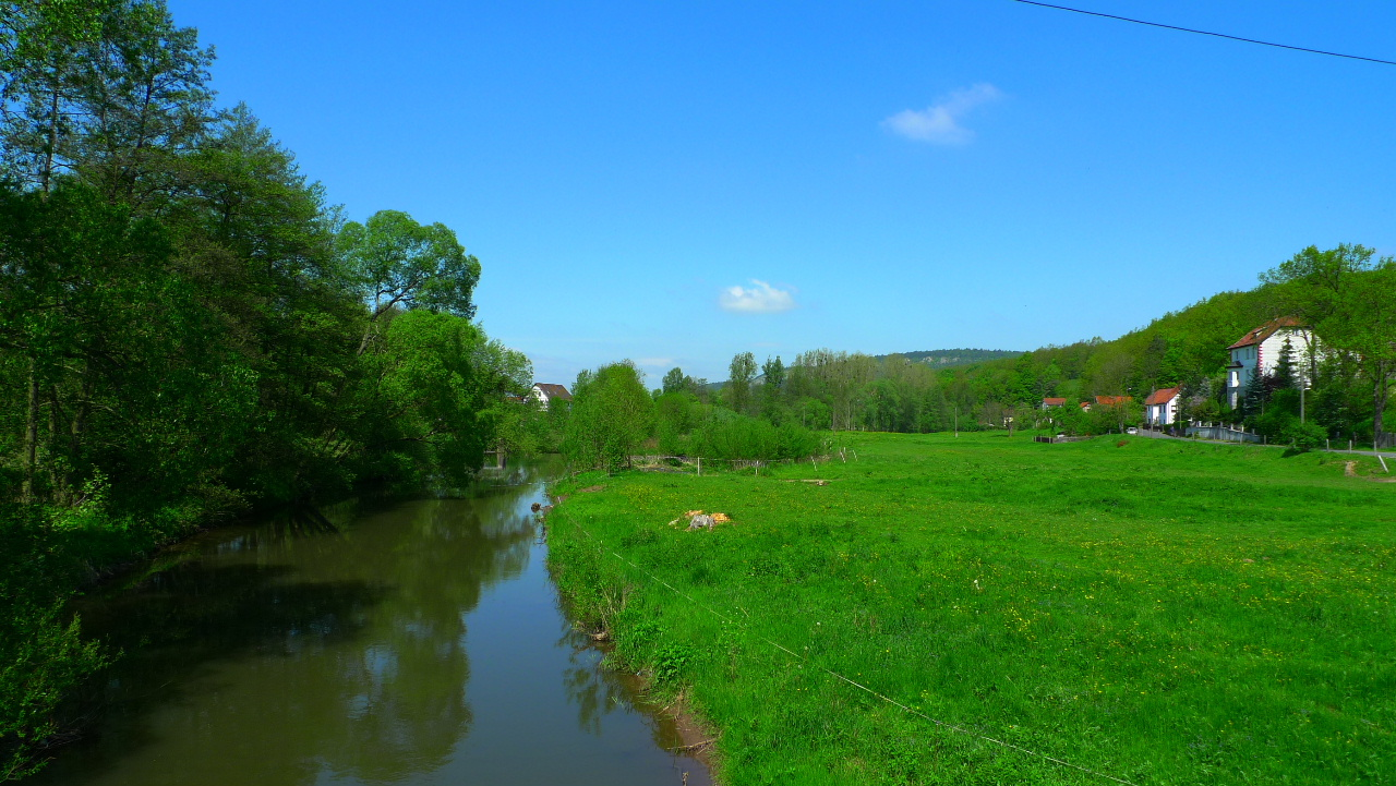 Blick von der Brücke in Schönau OT von Wutha-Farnroda, westwärts zur Hörselmühle, rechts einige Häuser von Kahlenberg.